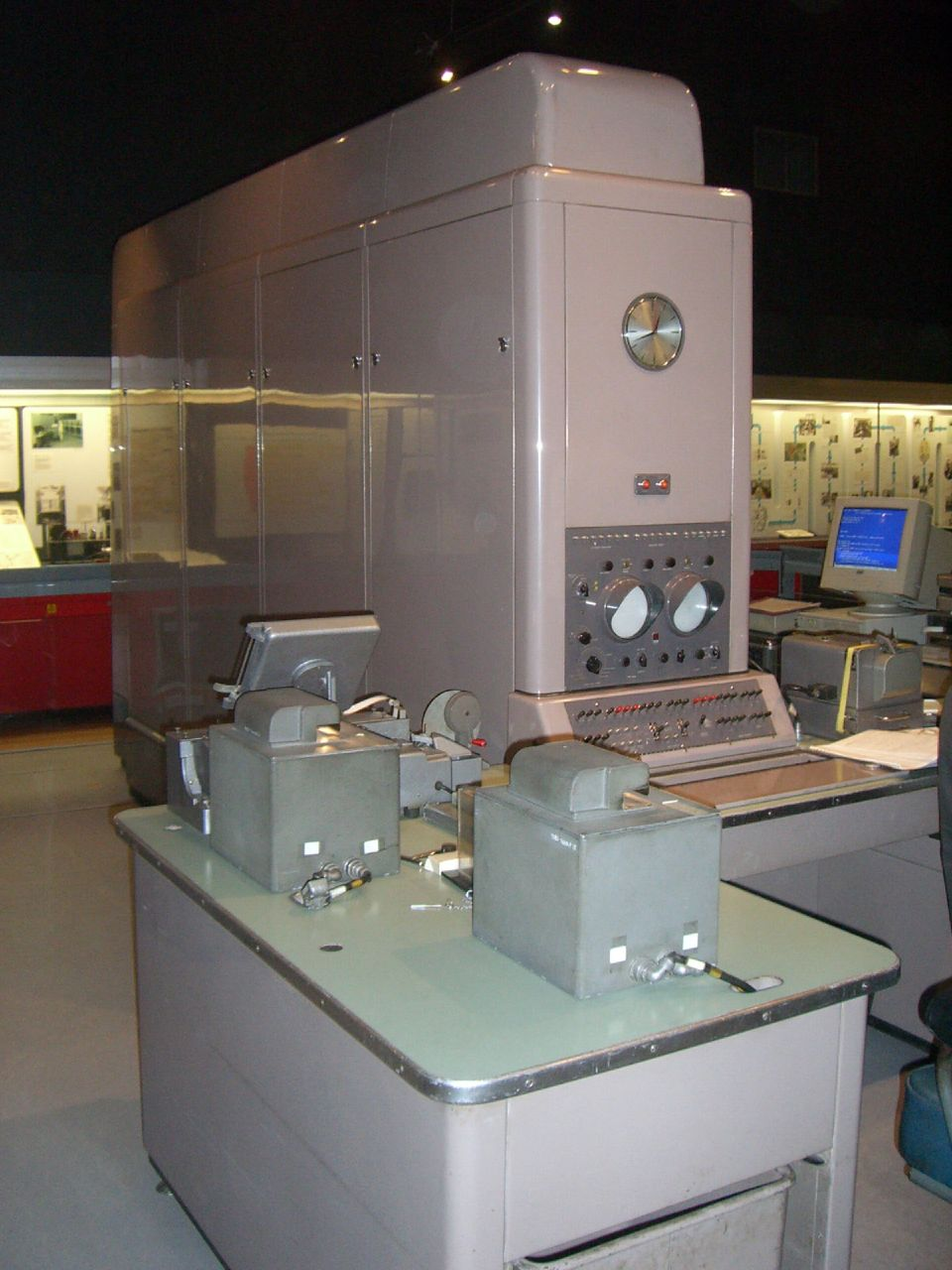 Ferranti Pegasus Computer (1959)